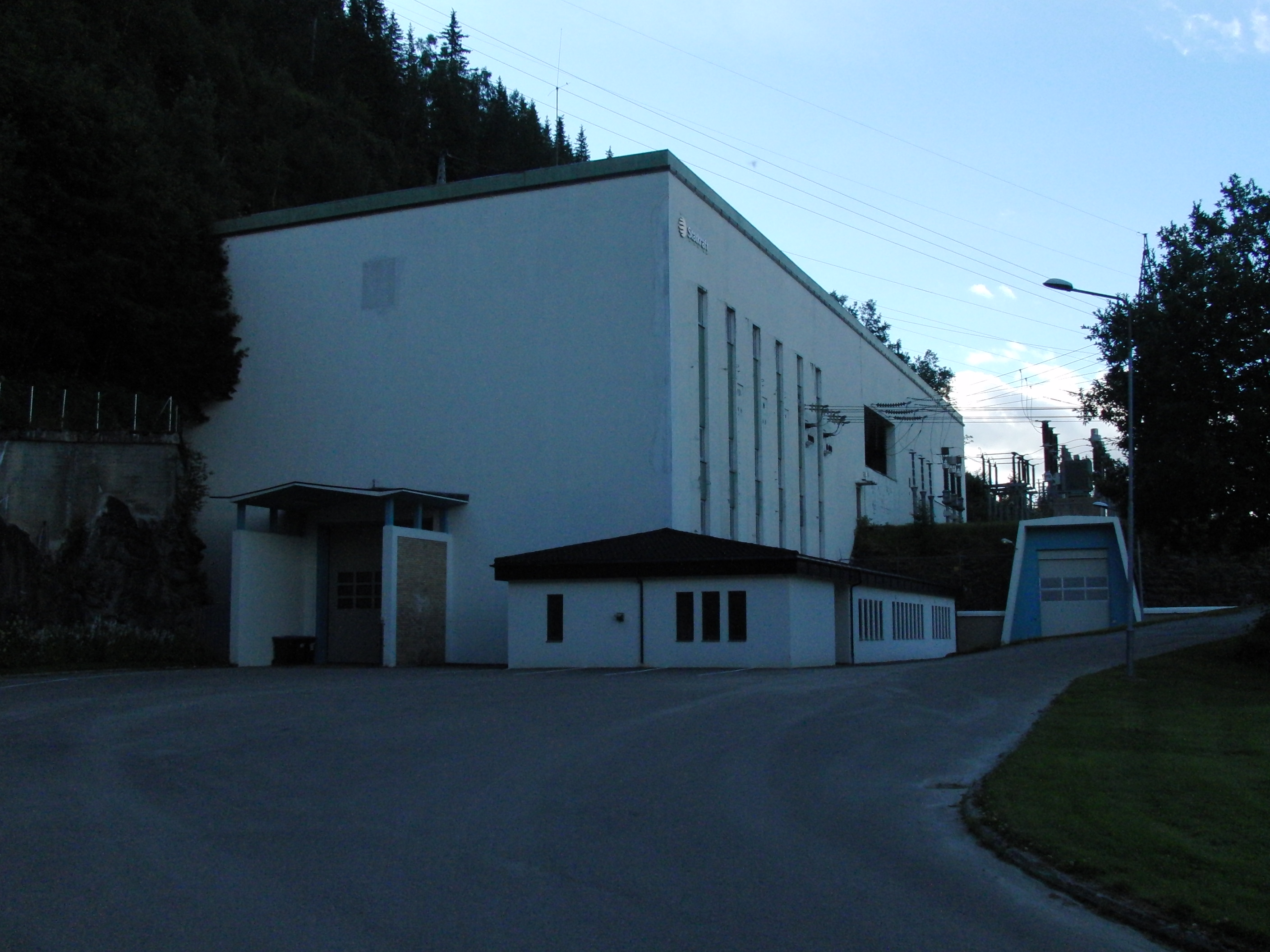 Langvatn kraftverk